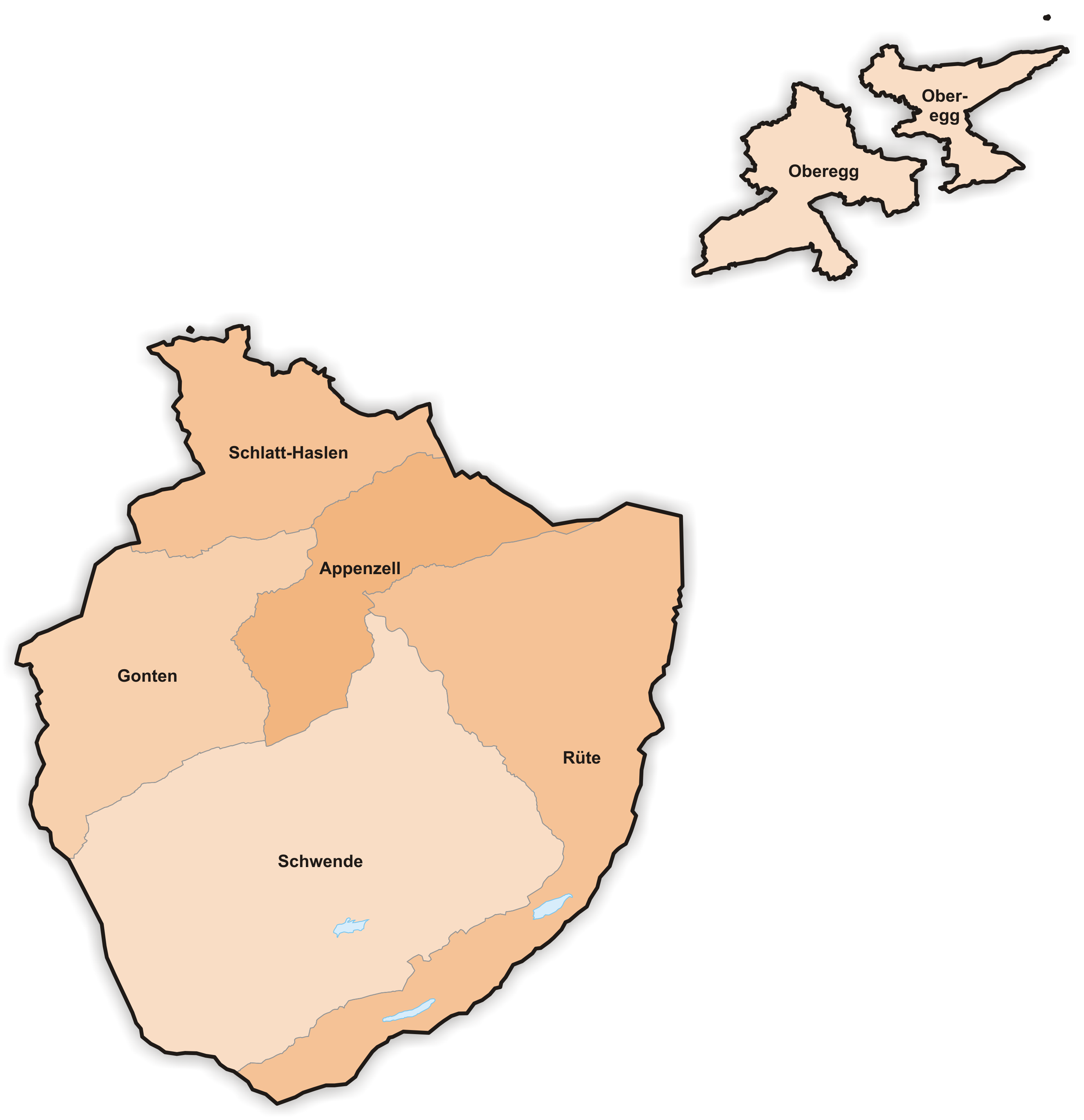 Municipalities in Canton Appenzell Innerrhoden